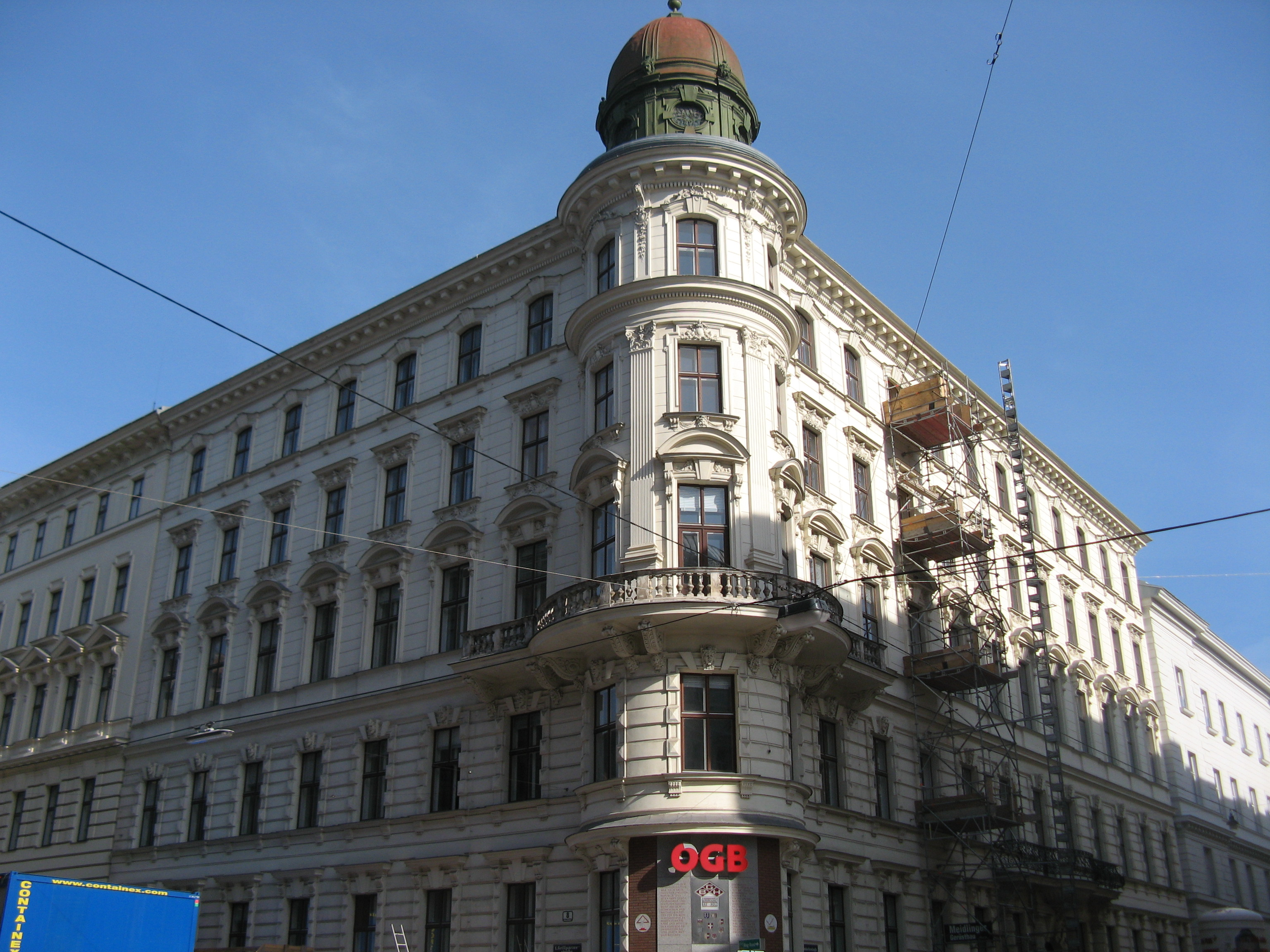 Haus (1882-83) von Heinrich von Ferstel und Karl Köchlin, Ebendorferstraße 7, Wien-Innere Stadt